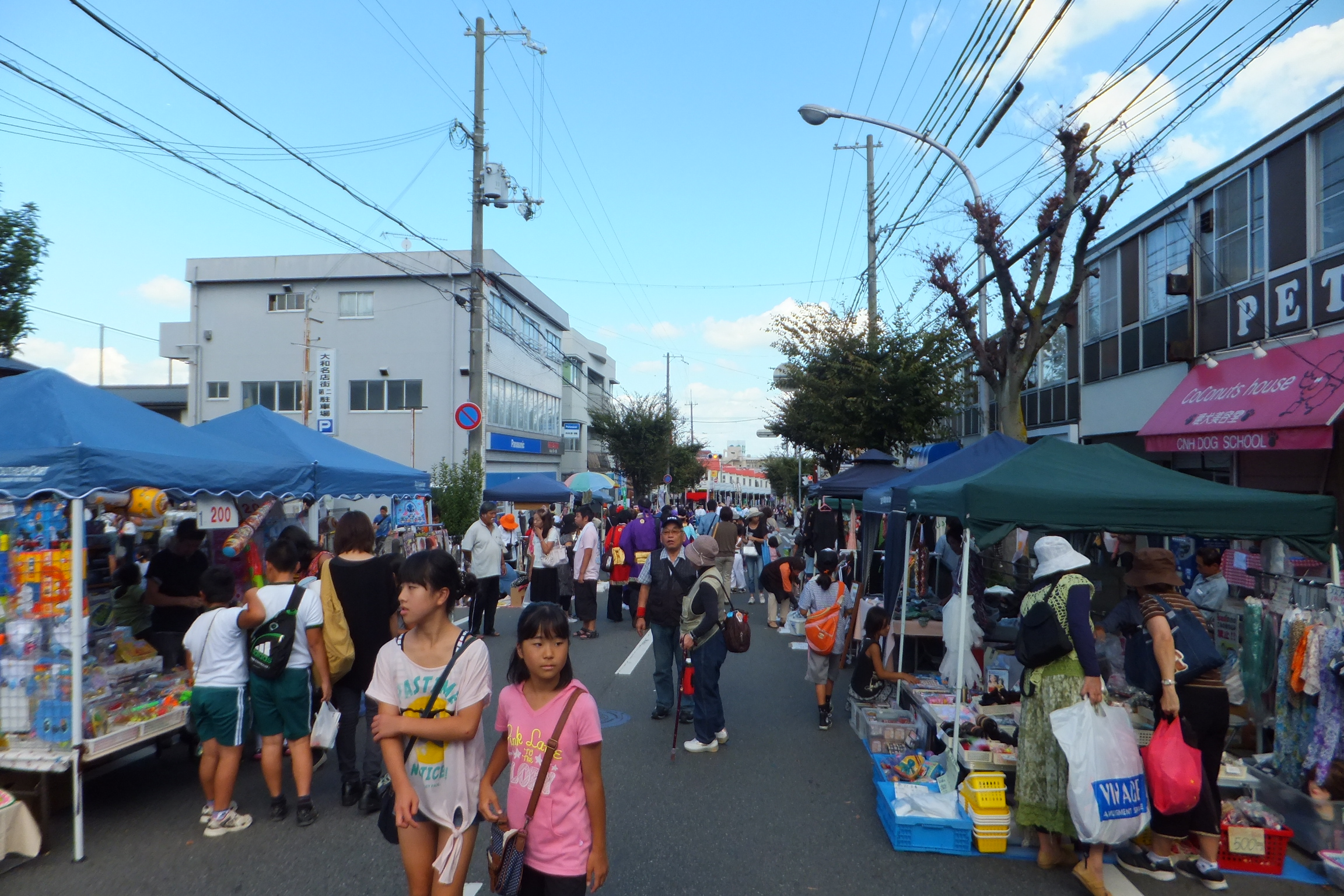 2013年三木さんさんまつり